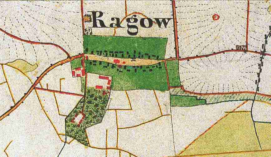 Ragow, Gem. Ragow-Merz, Landkreis Oder-Spree, Brandenburg, Ausschnitt aus dem Urmesstischblatt 3851 Beeskow von 1846